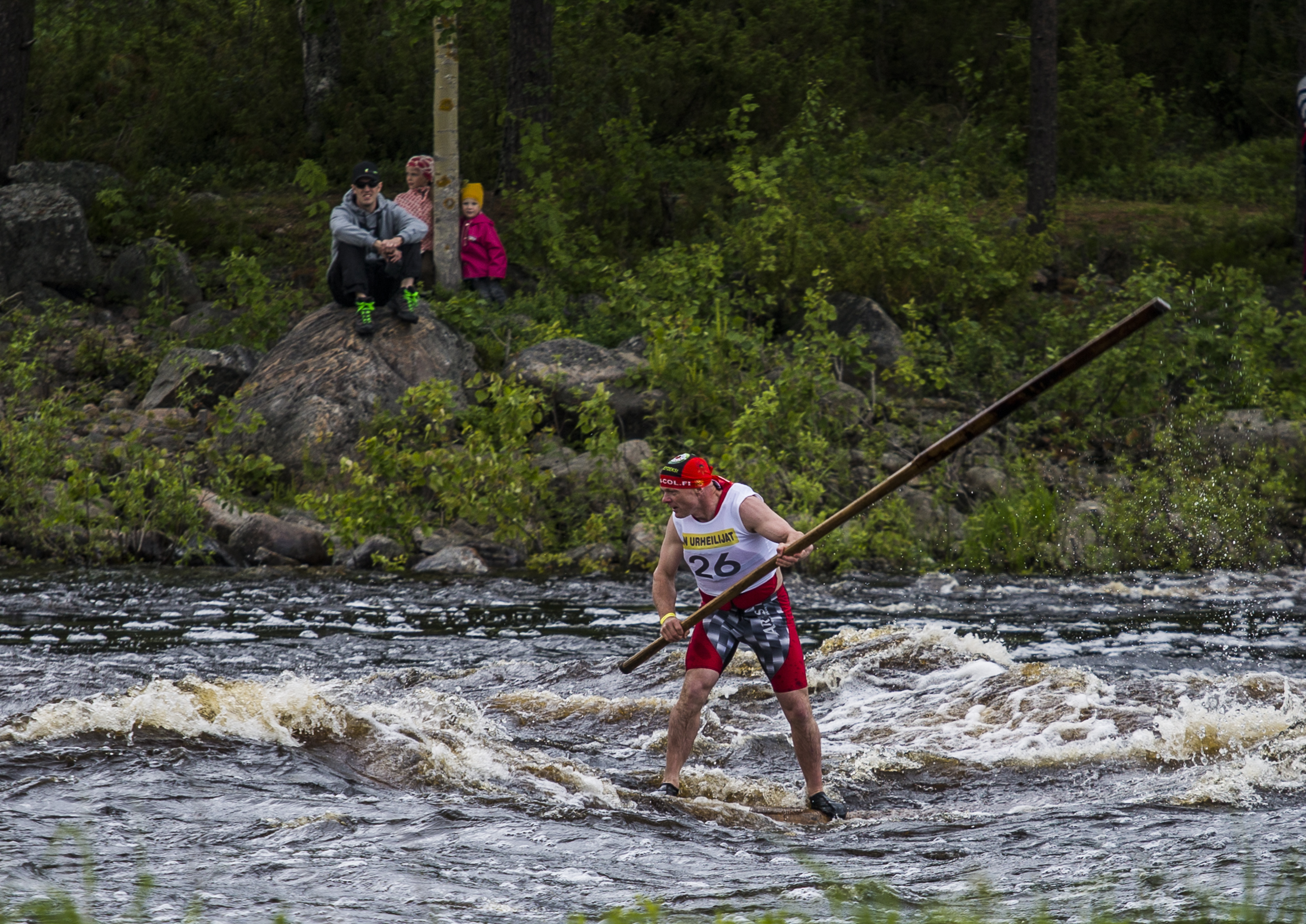 Kuningasjätkä Iin Raasakkakoskella 4.7.2015 Tukkilaiskisat, Koskenlasku